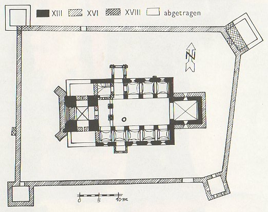 Planul fortificatiei din Merghindeal.